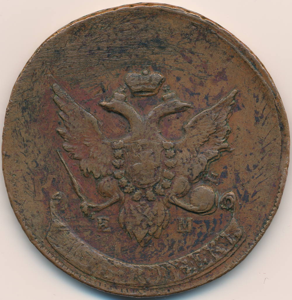 Совмещение неоднократного перечекана и двойного удара. Павловский перечекан, 1793.